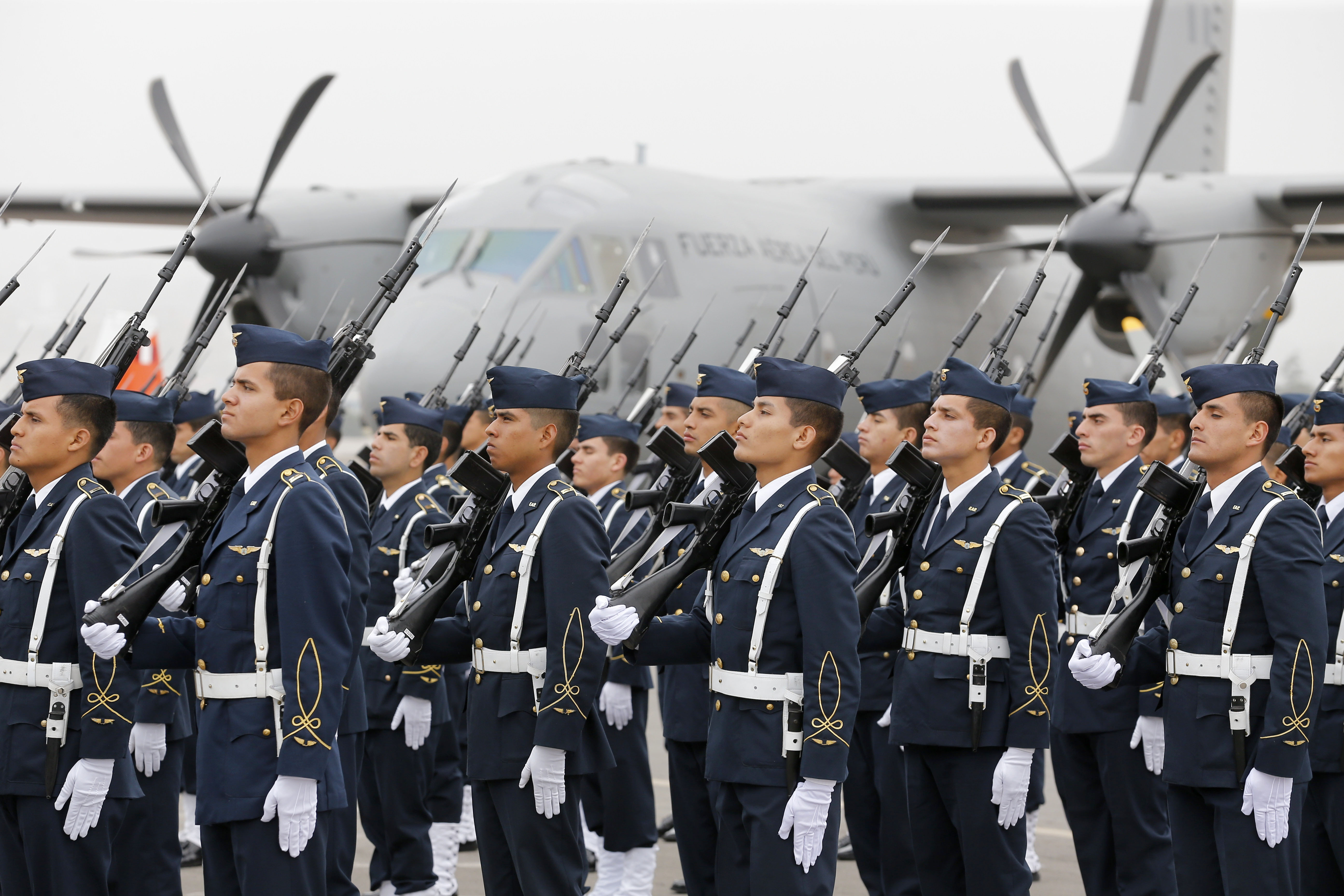 Jefe de Estado Ollanta Humala señaló que FAP demostró capacidad disuasiva para defender cada centímetro del territorio nacional en recientes ejercicios militares. El Ministro de Defensa Jakke Valakivi, acompañó al Presidente Ollanta Humala en la ceremonia de graduación de cadetes y clausura del año académico de la Escuela de Oficiales de la Fuerza Aérea del Perú, en la Base Aérea de Las Palmas. En esta oportunidad se graduaron 49 alféreces, 44 hombres y 5 mujeres, de los cuales 17 se encuentran becados en países como Rusia y Brasil. La espada de honor en mérito a su desempeño académico correspondió al Cadete Renzo Martinelli Melgar. A continuación el Presidente Ollanta Humala tomo el juramento de honor a los nuevos oficiales, tras entregarle sus respectivas espadas. El presidente Humala destacó la formación académica recibida por los 49 nuevos oficiales y resaltó que el presente gobierno se ha esmerado por invertir en el recurso humano de manera que egresen de las aulas con una sólida base que les permita servir al país desde los lugares que les toque ser asignados. Asimismo, el Jefe de Estado resaltó la inversión en infraestructura y equipamiento del material con el que cuenta la FAP a través de modernas arnas de combate que quedaron demostrados en los recientes ejercicios militares con acciones disuasivas que aseguró, servirán para defender cada centímetro del territorio nacional. En la parte final de la ceremonia aviones KT-1P pasaron raudos por el cielo en señal de saludo a las autoridades. Oficina de Prensa Ministerio de Defensa 209 8530 anexo 4152